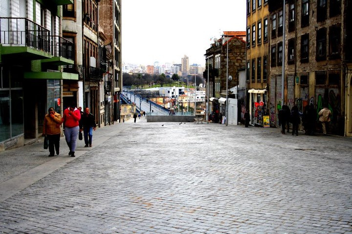 Avenida de Vímara Peres, Porto, Portugal